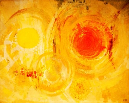 A NYÁR (80x100 cm, olaj, vászon) A felfokozott hőség, beteljesedő formák, minden a tökéletesség, a gömb felé irányul. Az érés belső feszültsége, a levegő szinte elektromos töltése, mozgás nélkülisége van jelen. Fülledtségét a sárgák, narancsok, a fehér és ezek tónusai éreztetik.